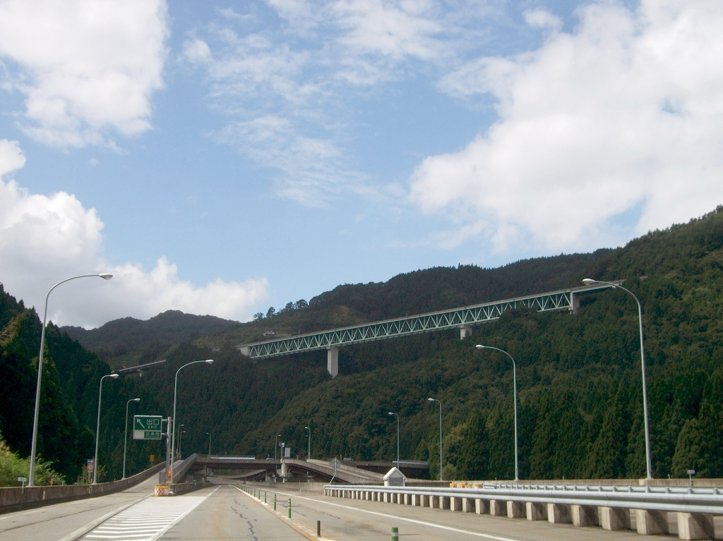 中部縦貫自動車道 油坂峠道路 白鳥西インターチェンジ付近 （下り線）